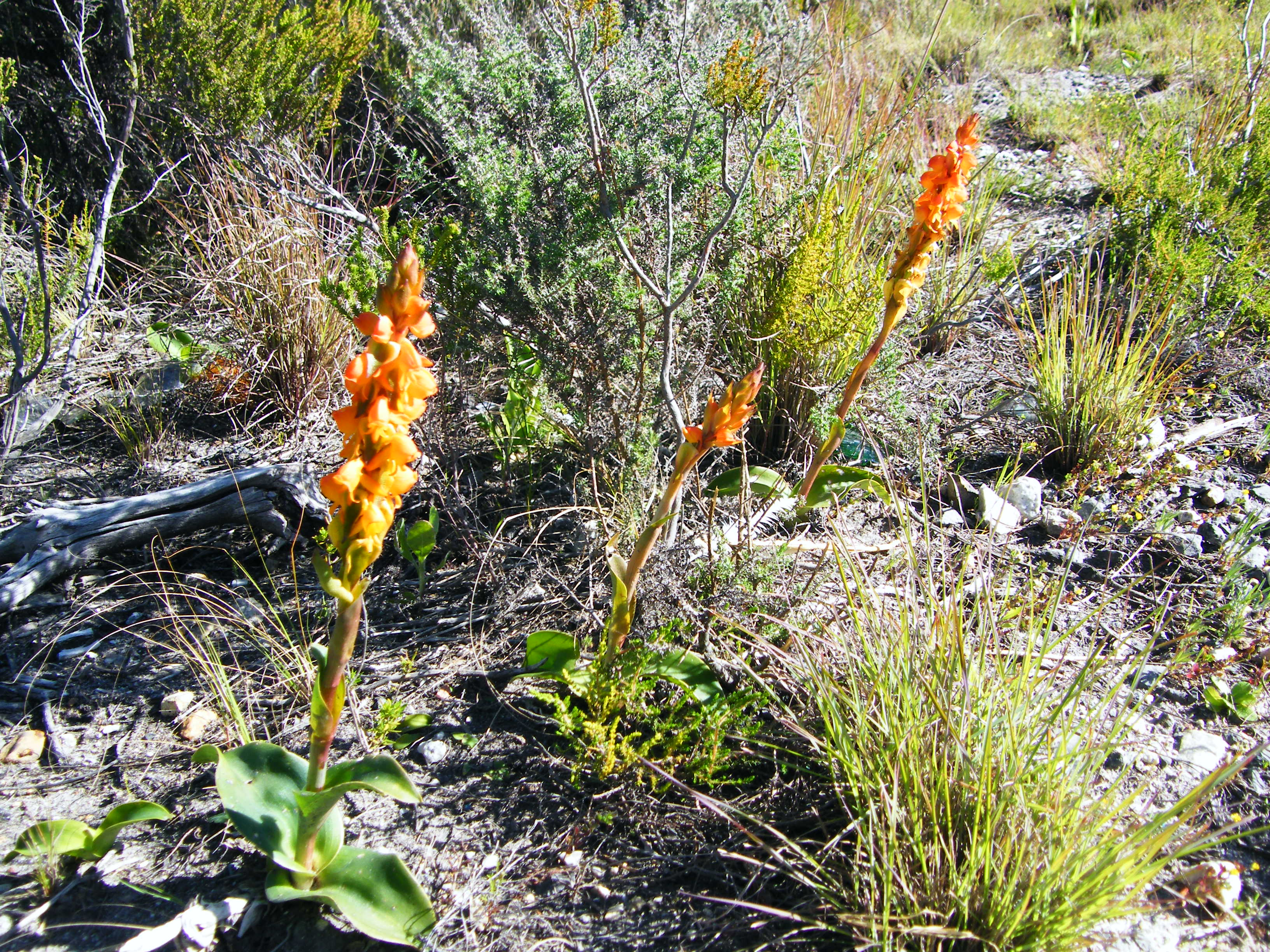 Ewwatrewwa